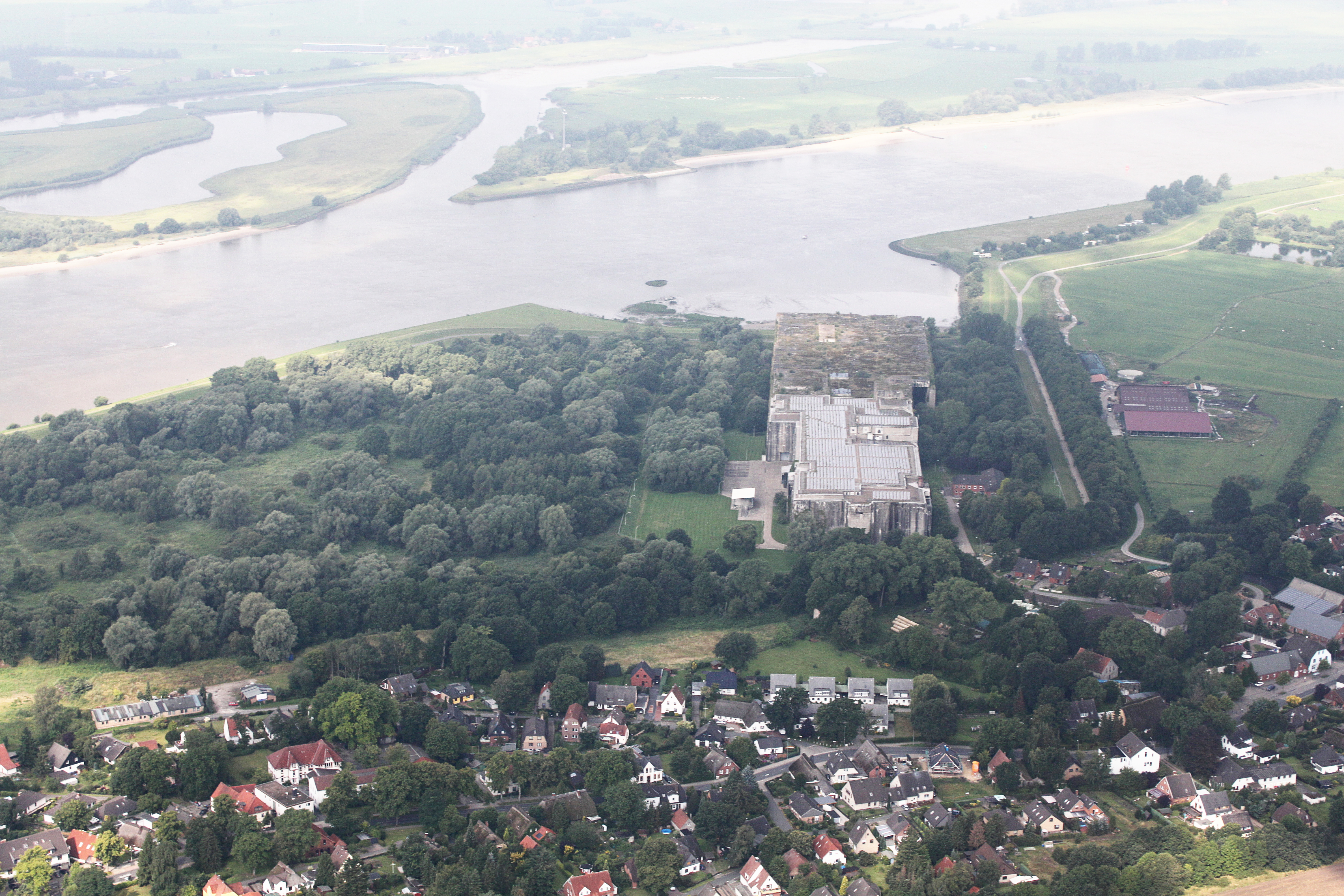 Fotoflug Bremen; Flughöhe 500 m; von der Autobahnabfahrt der A 27 in Bremen-Nord über Vegesack zum U-Boot Bunker Valentin